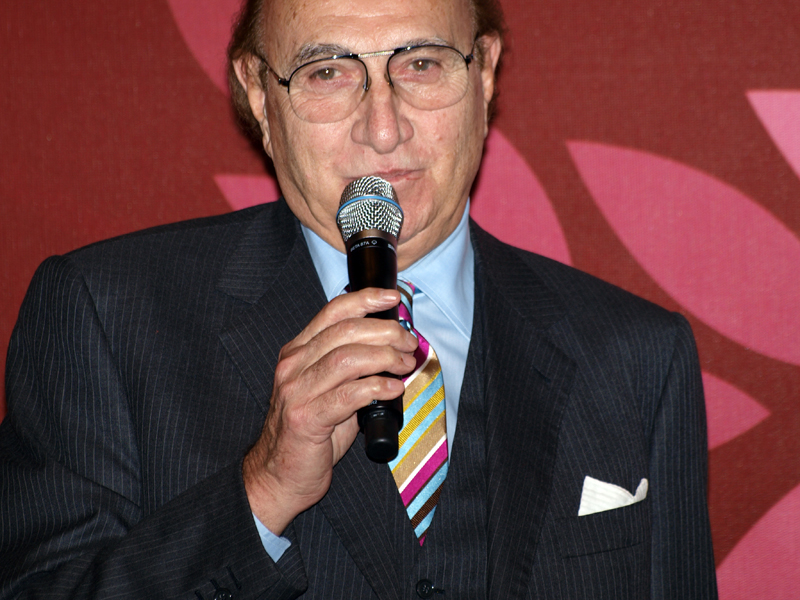 Pippo Baudo - Foto di G. M. Ireneo Alessi (Sinix)